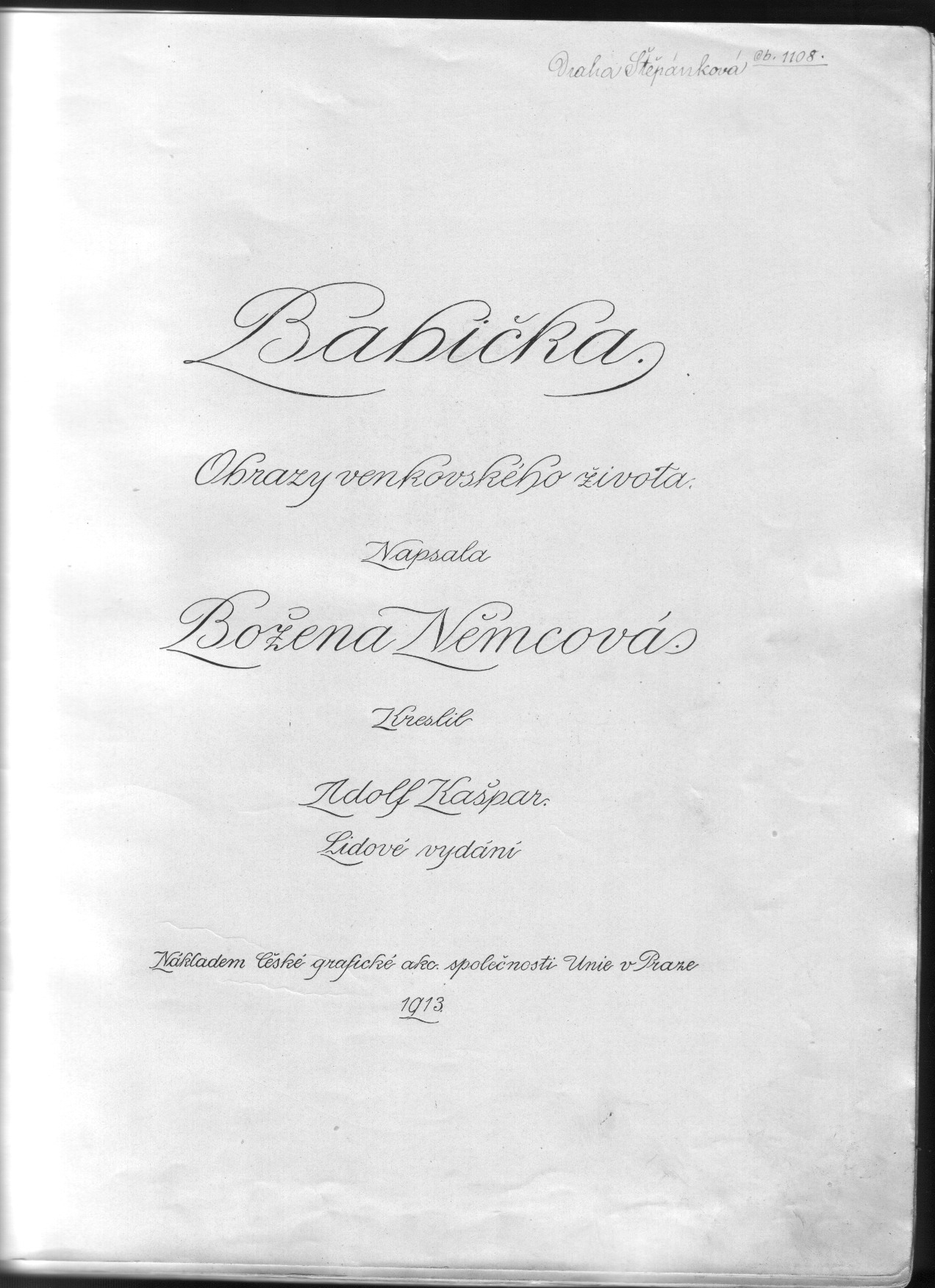 Úvodní list z Babičky od Boženy Němcové ve vydání České grafické akc. společnosti Unie v Praze z roku 1913.